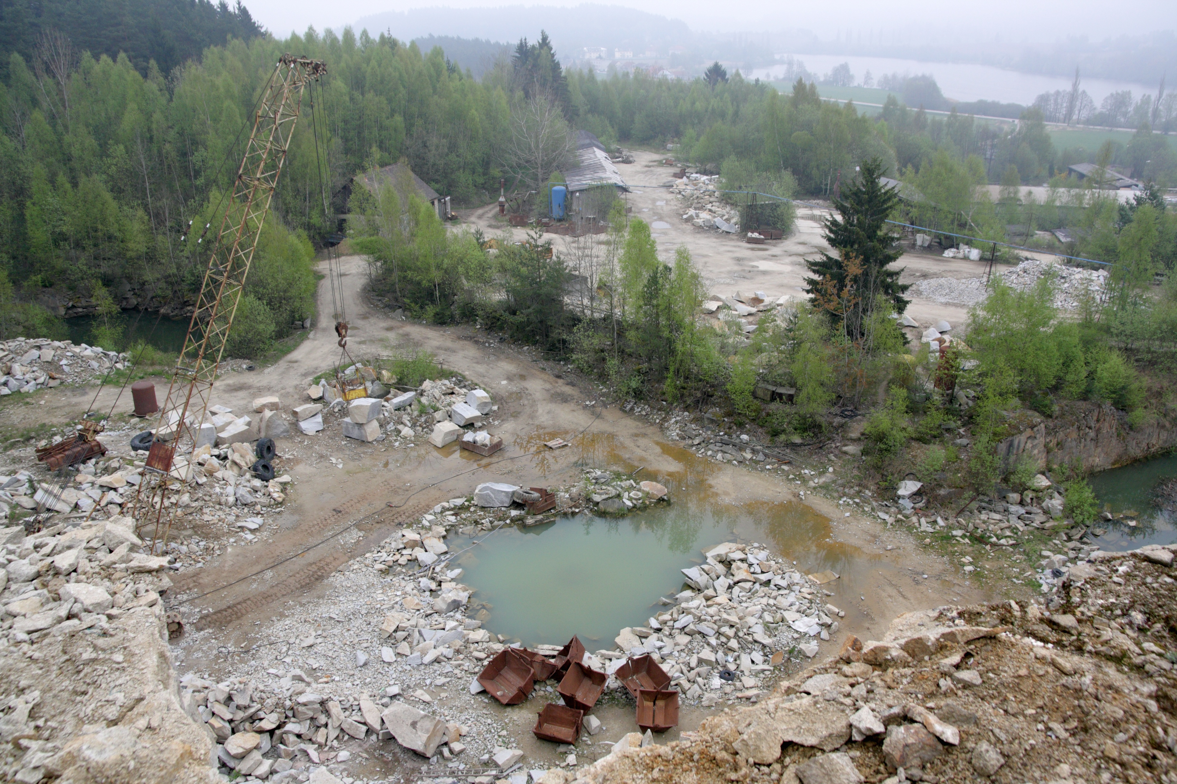 Mrákotín (okr. Jihlava) - žulové lomy v okolí Mrákotína.